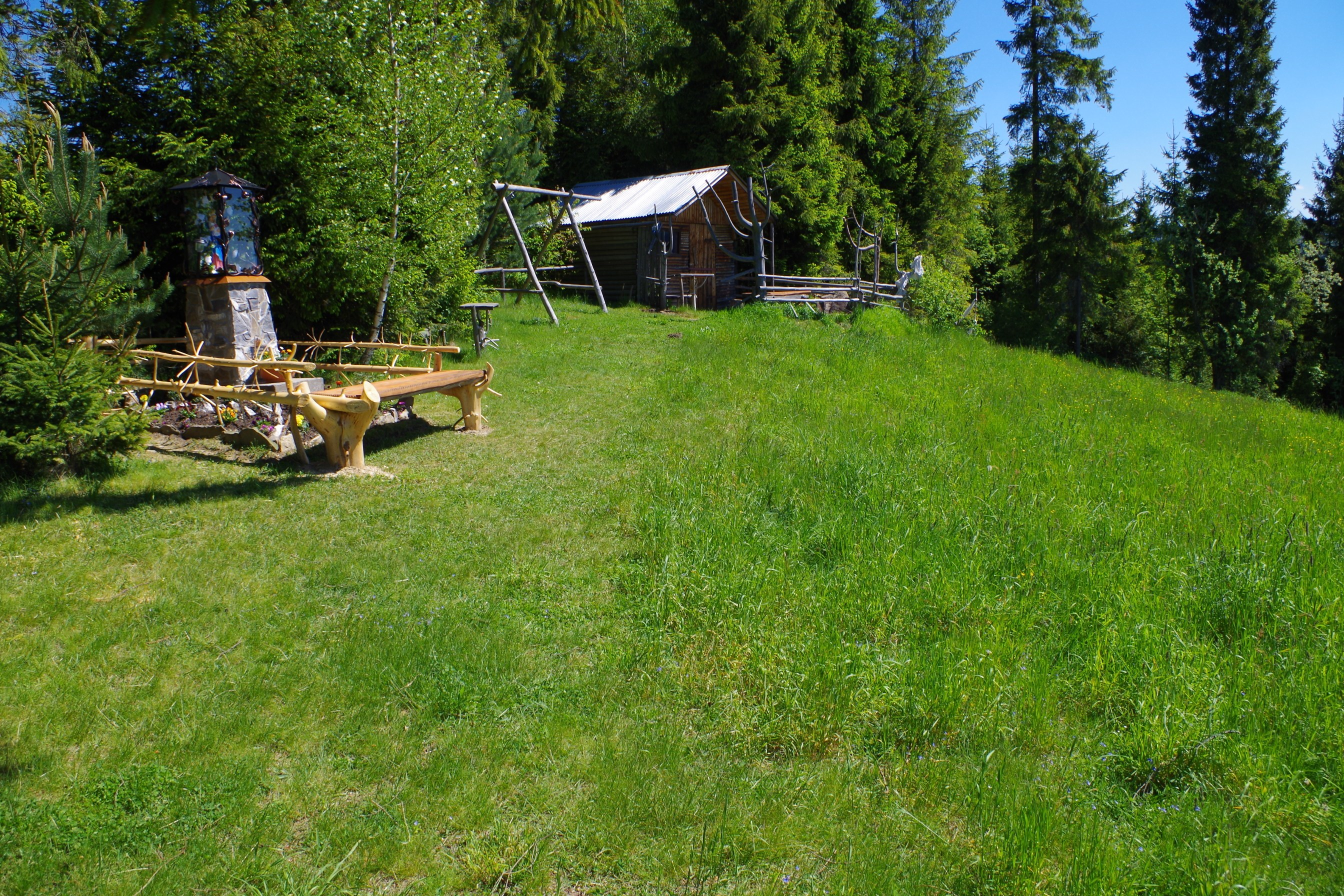 polana Matyjówka na grzbiecie Bukowiny Obidowskiej